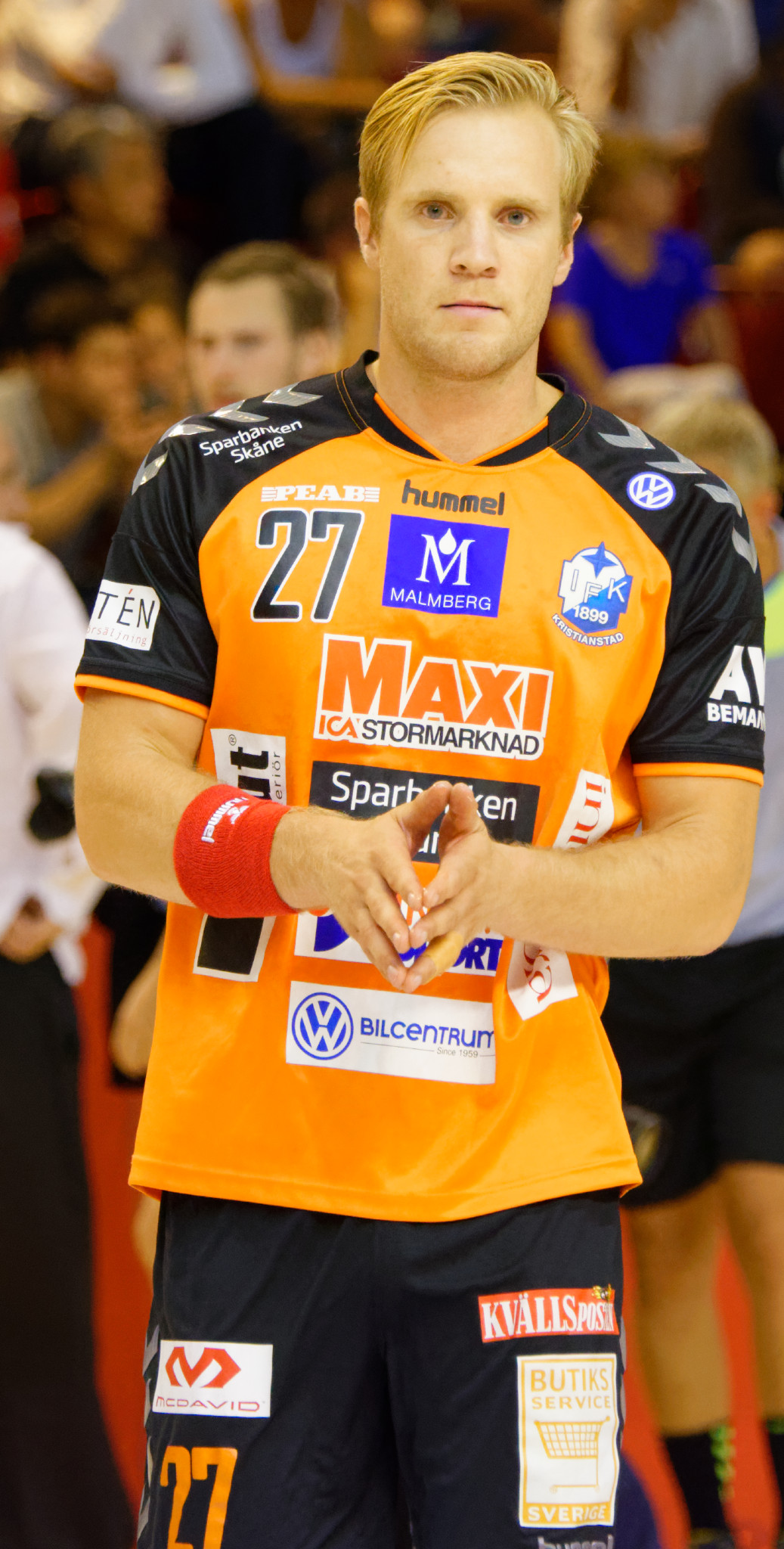 Rencontre du challenge Marrane 2016 entre l'US Ivry et les danois de IFK Kristianstad. A la Halle Carpentier (Paris 13e), le 04 septembre 2016.